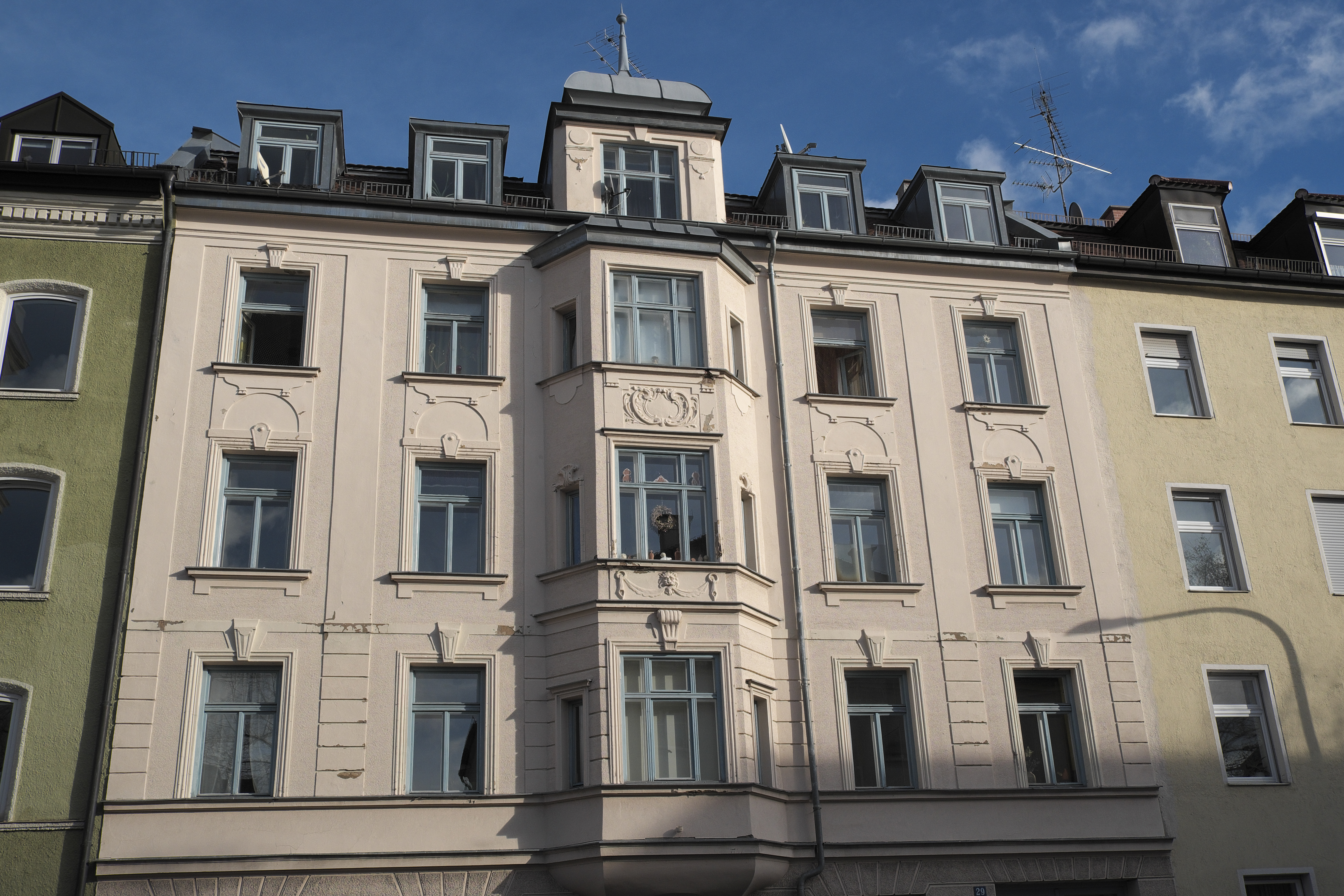 Mietshaus in der Balanstraße 29 in Haidhausen im Stadtbezirk Au-Haidhausen in München (Bayern/Deutschland), um 1890/1900 erbaut